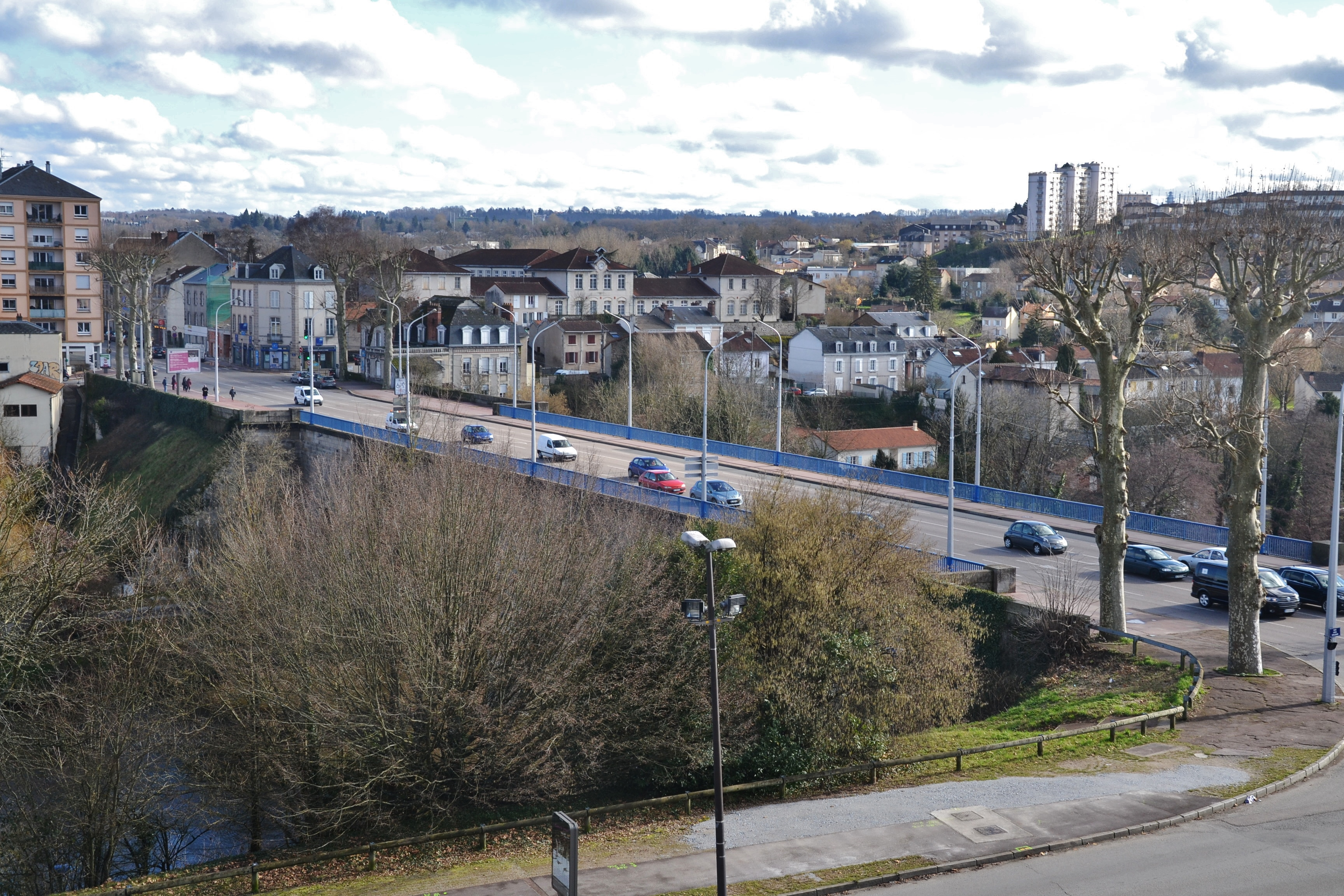 Le pont Neuf de Limoges, vu depuis les jardins de l’Évêché (Haute-Vienne, France)